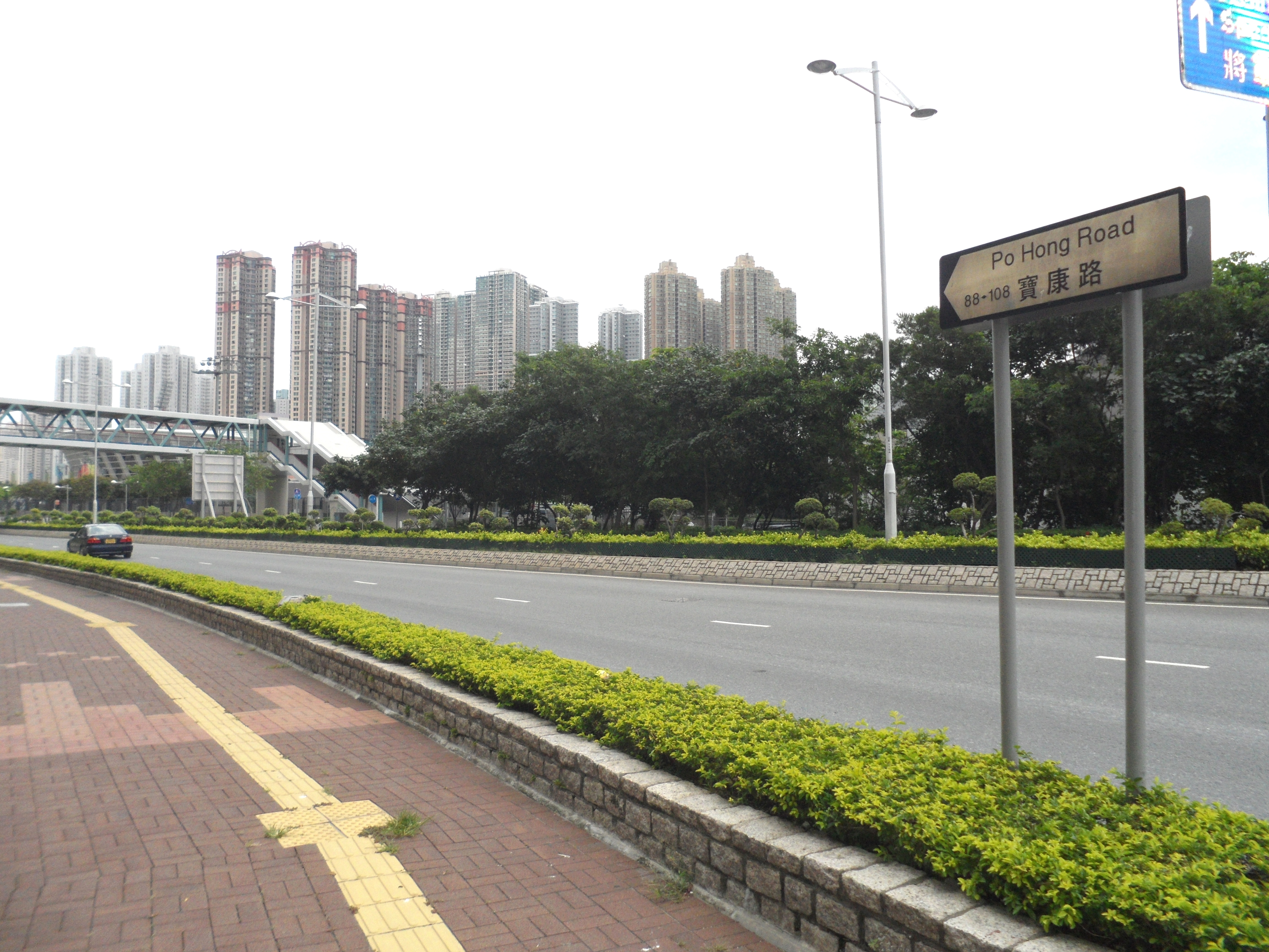 寶康路往將軍澳運動場方向路段